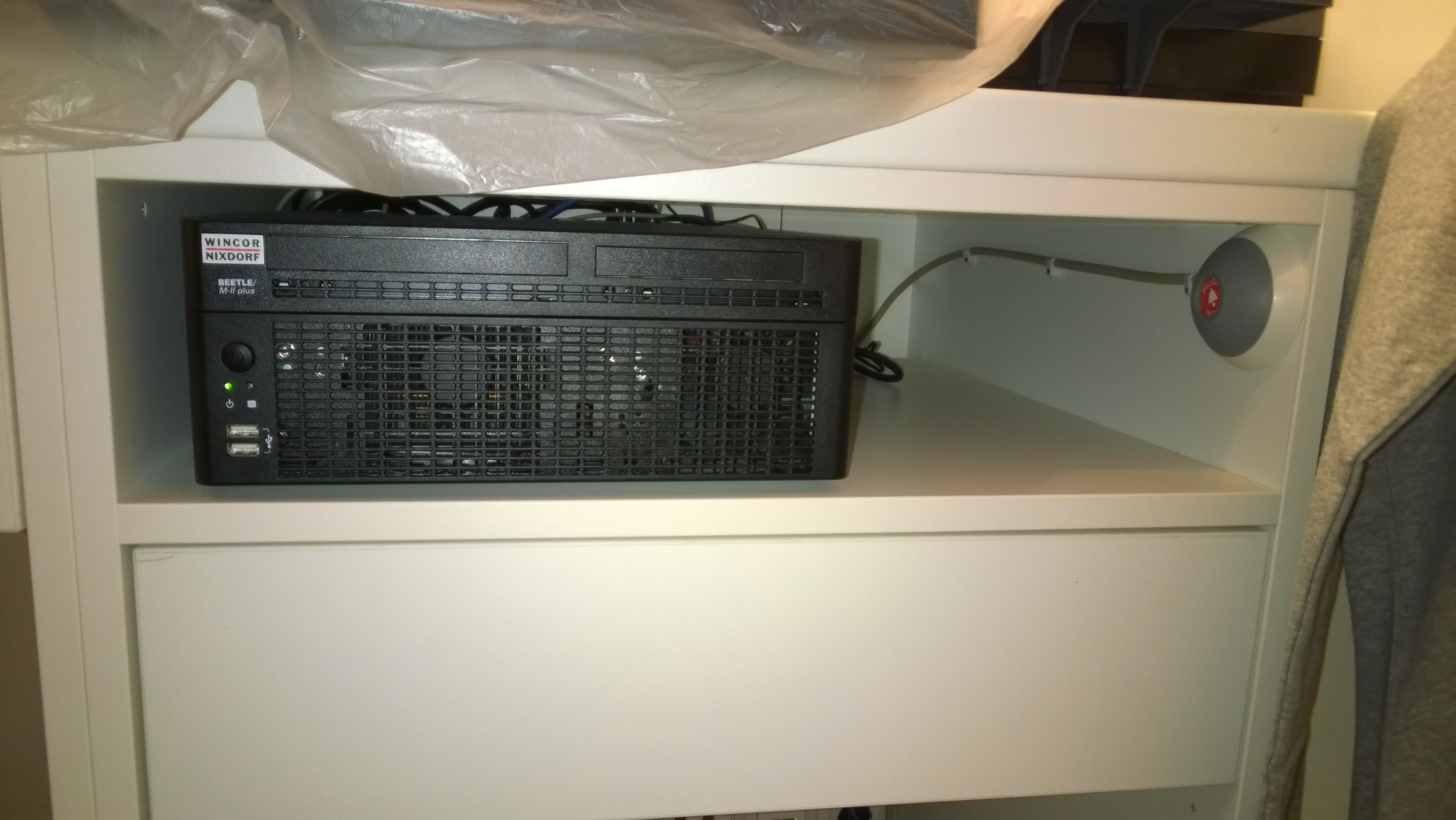 Plombierter Überfallmelder im Kassentresen einer Einzelhandelsfiliale